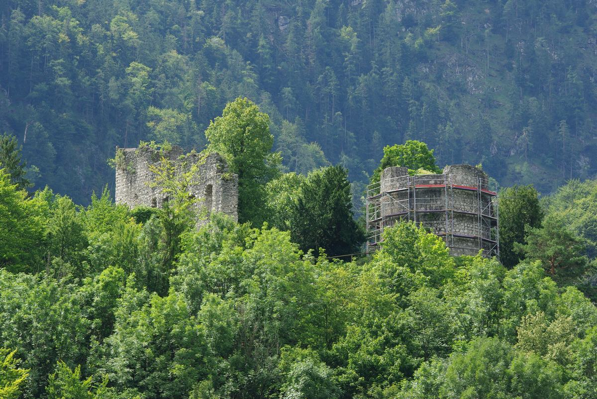 Schmalschlägerstraße, 83435 Bad Reichenhall, Burgruine Karlstein, während der Bauarbeiten III/IV/2012, Ansicht von NordenThis is a photograph of an architectural monument.